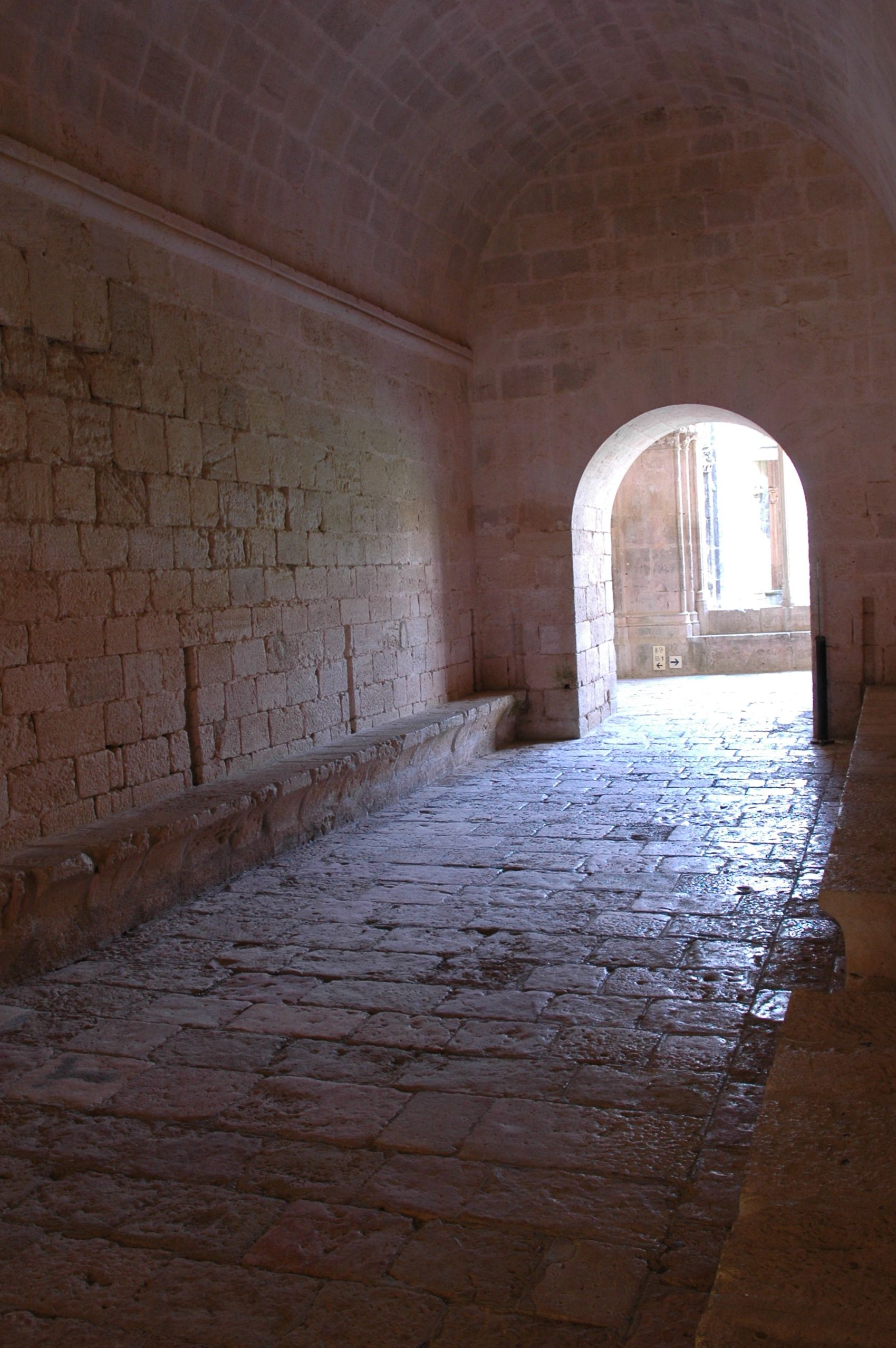 Monestir de Santes Creus - Locutori